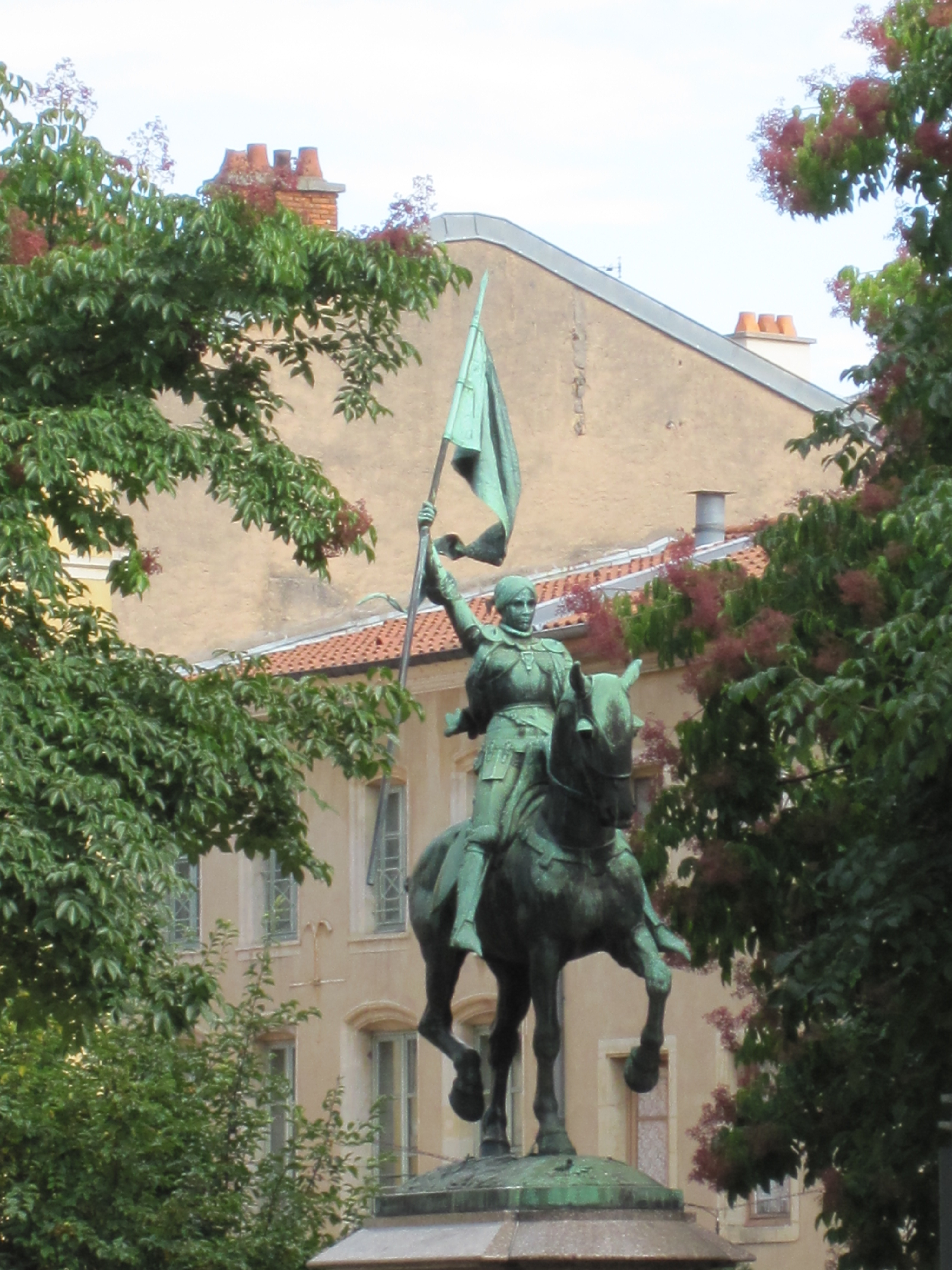 Statue équestre de Jeanne d'Arc réalisée par Frémiet en 1889, donnée à Nancy par M. Daniel Osiris Iffla